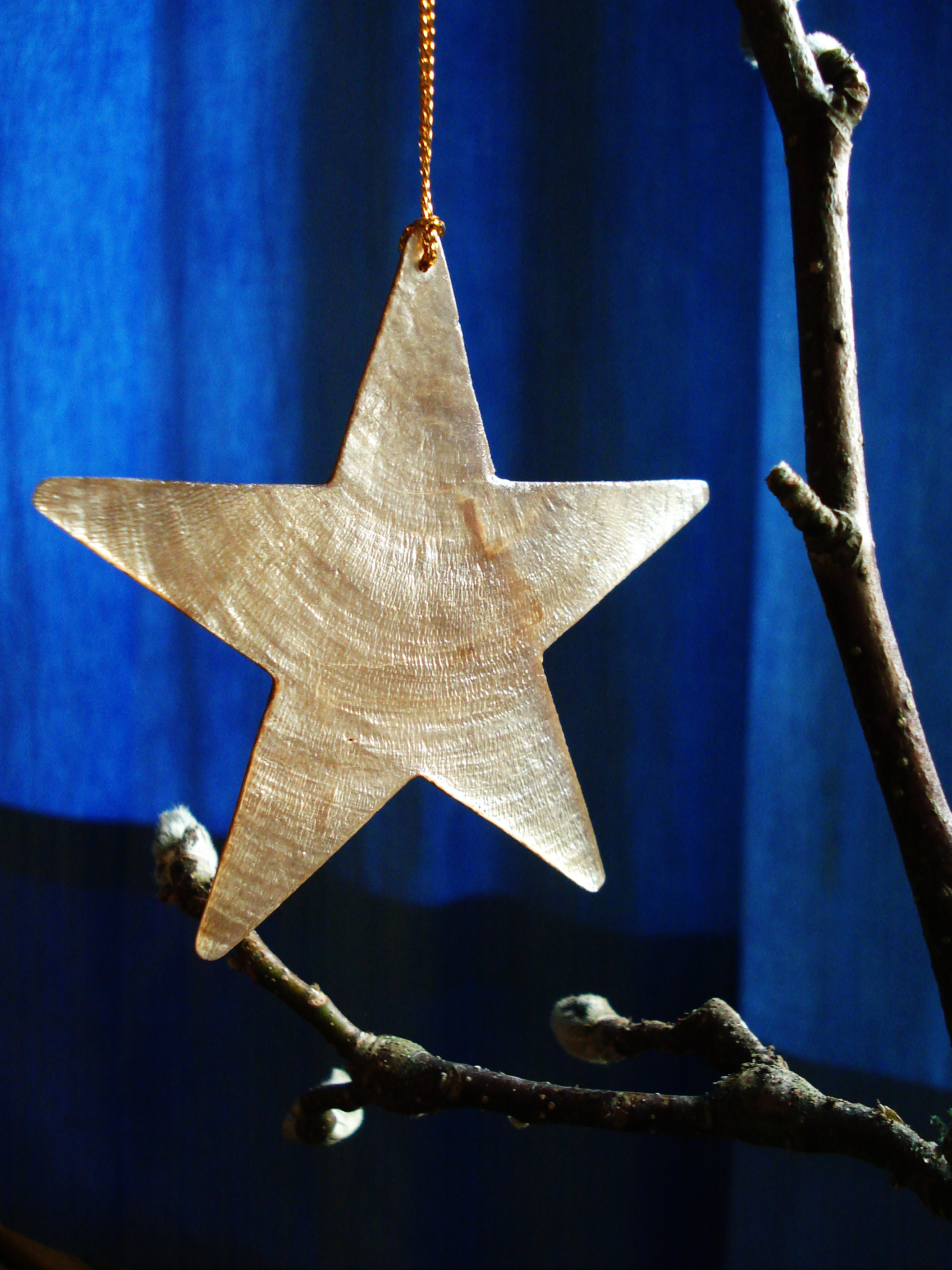 Weihnachtsstern aus Capiz-Muschelschale